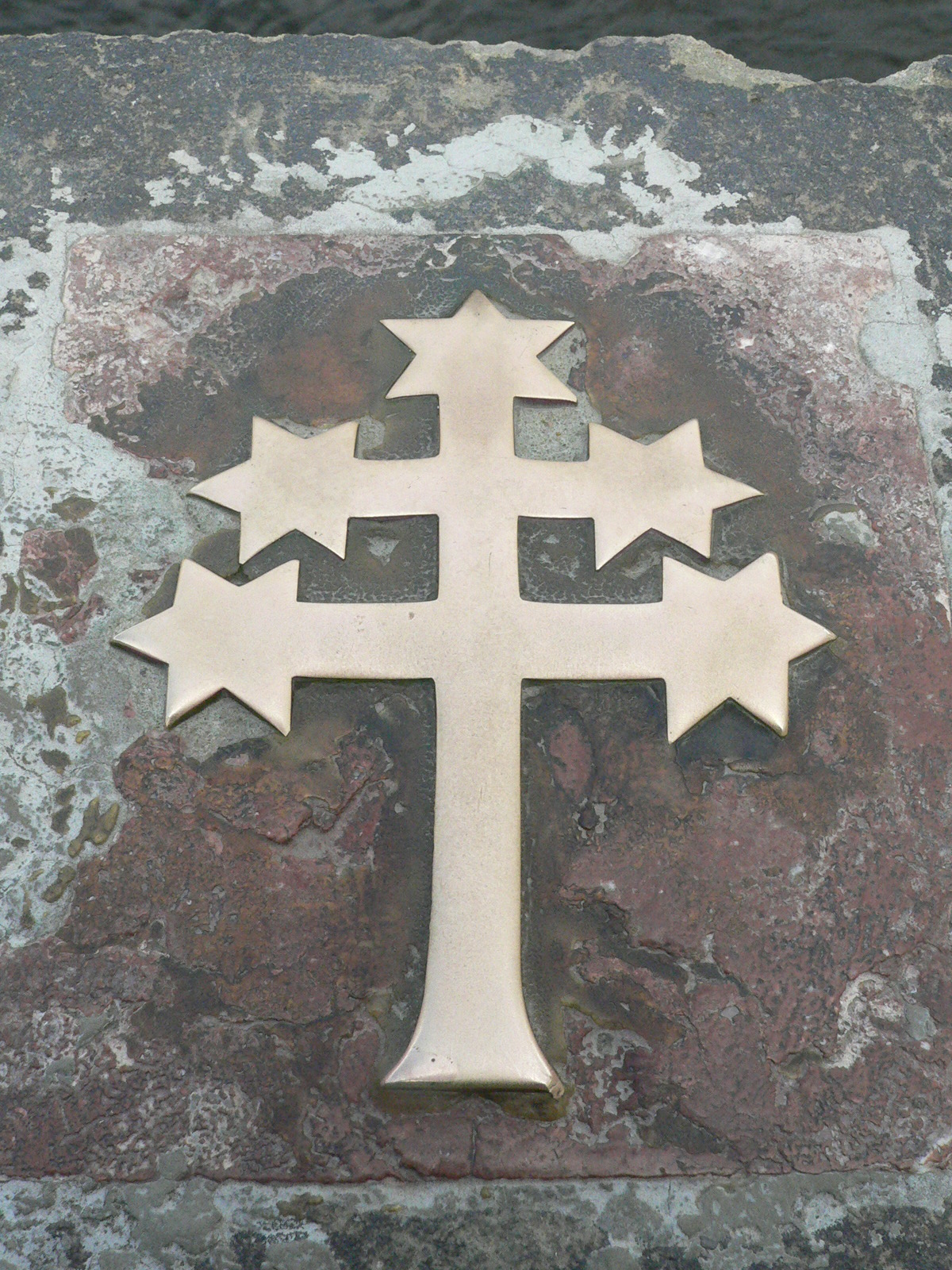 A sárgaréz kereszt a Károly-híd korlátján (Prága)